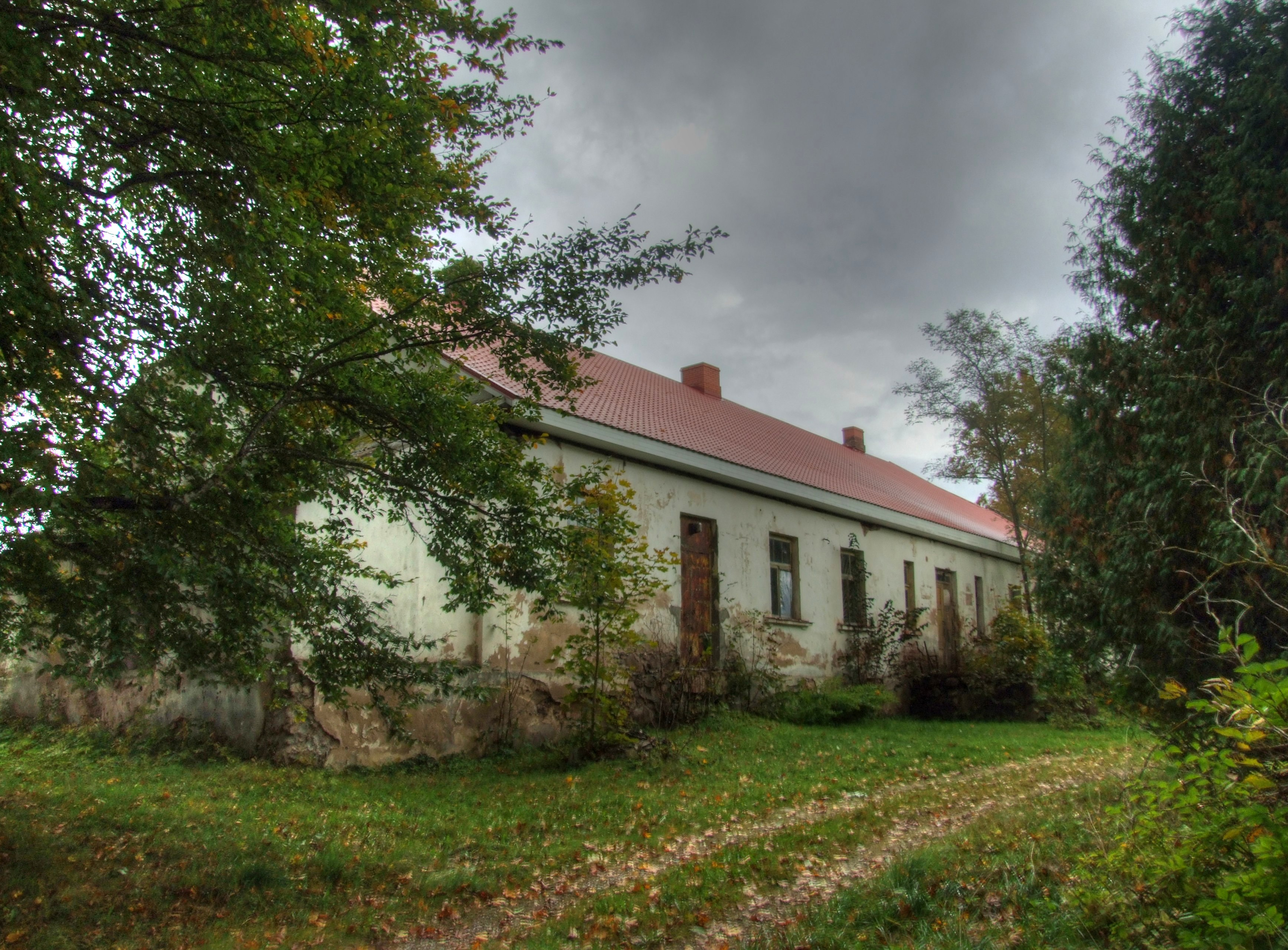 Garlene